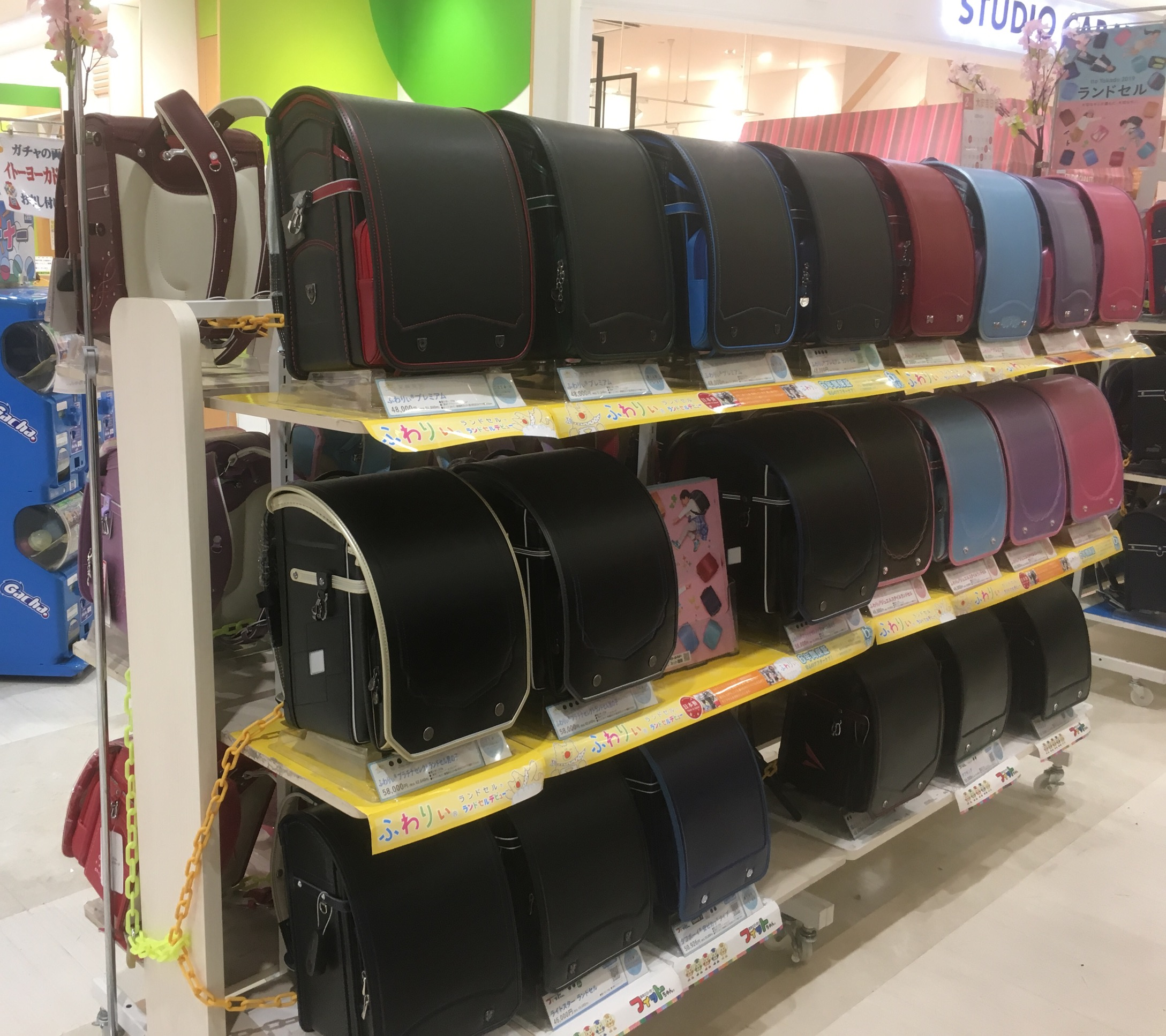 新学期を前にして販売されているランドセル。イトーヨーカドーアリオ西新井店にて。